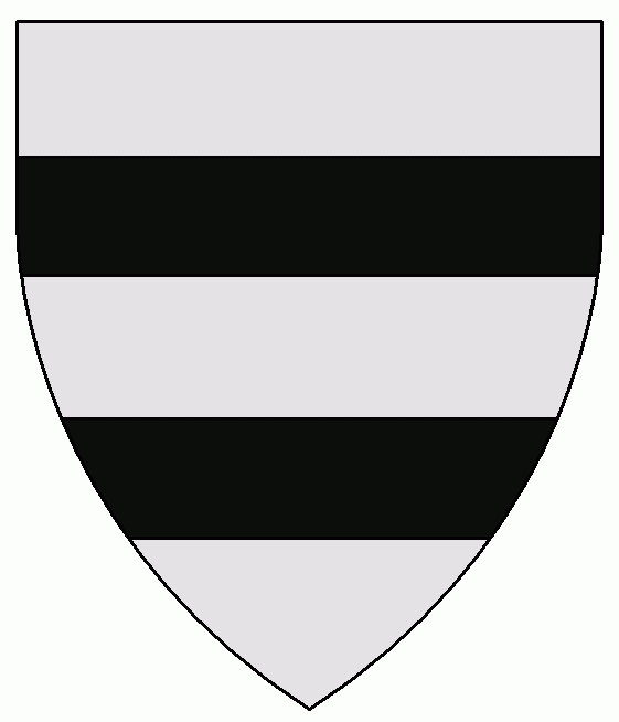 Escut d'armes de la família Fortià (s. XIV) / Coat of arms of Fortià family (14th c.)